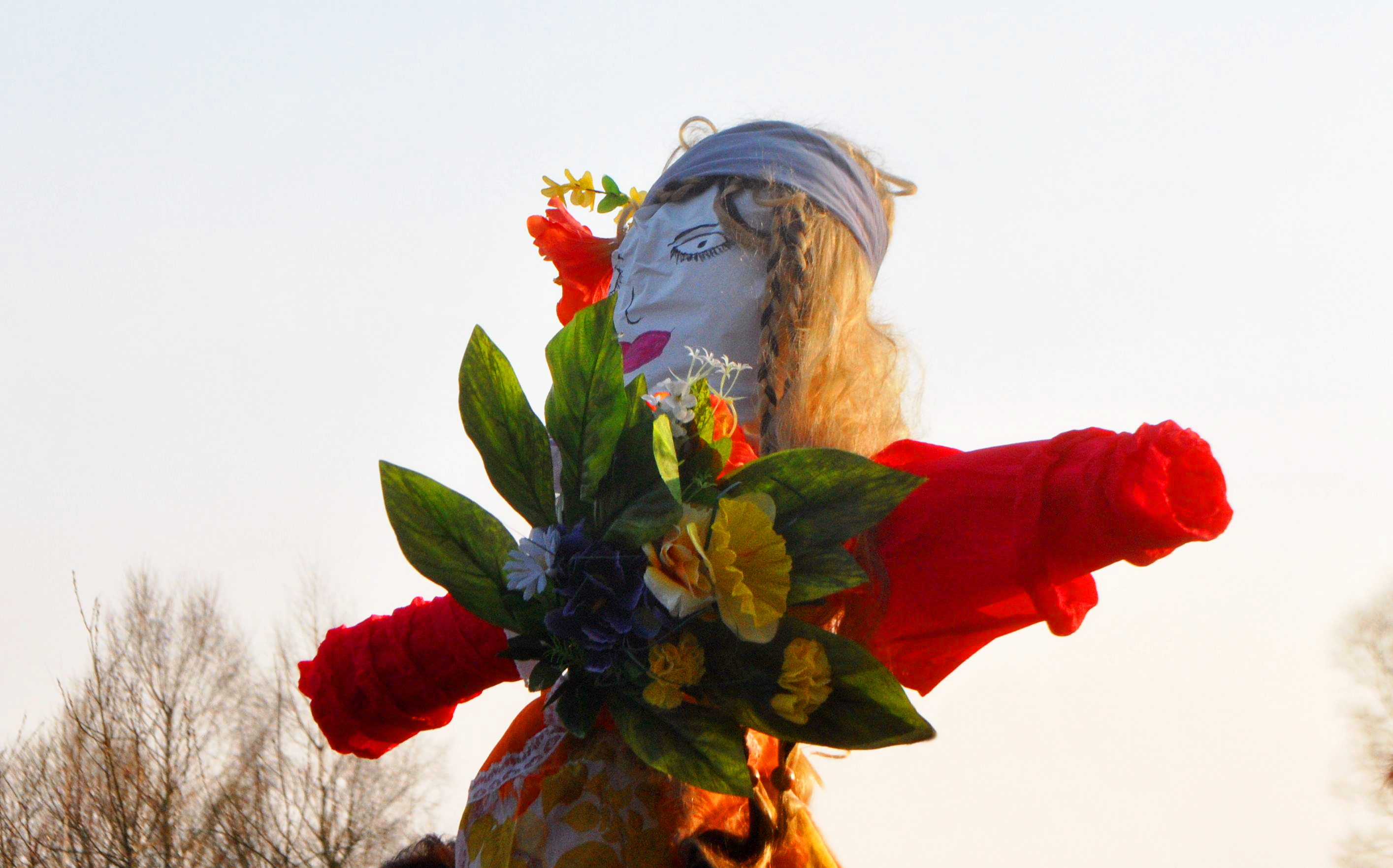 Pochód z Marzannami nad rzekę Brynicę, Miasteczko Śląskie 21 marca 2015